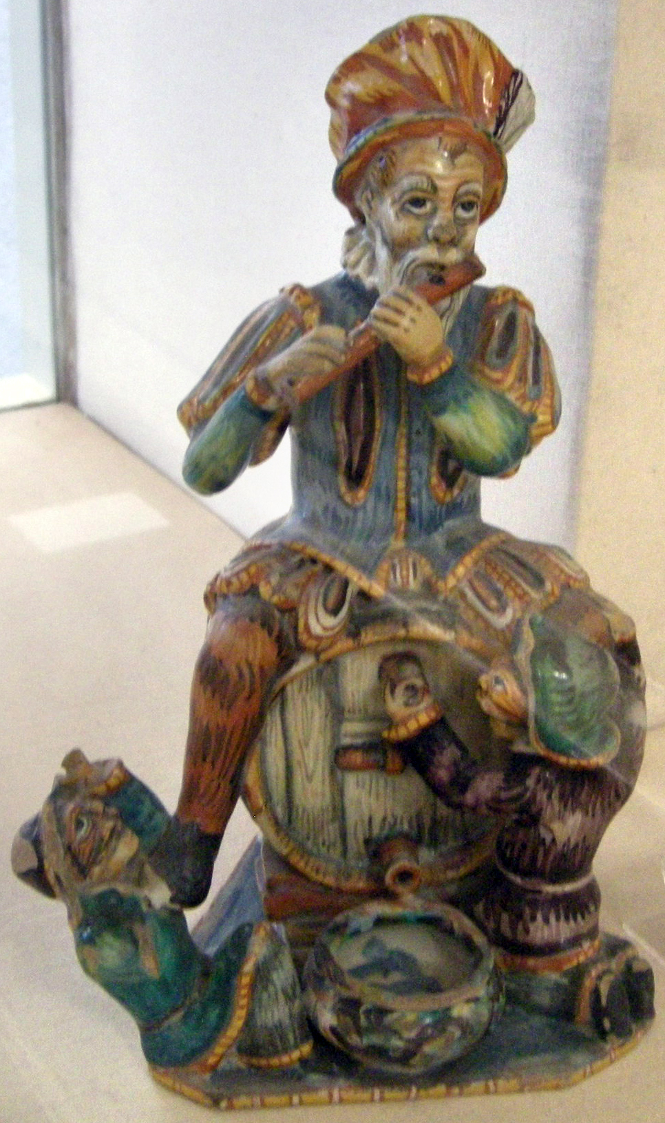 Museo Civico This is a photo of a monument which is part of cultural heritage of Italy.